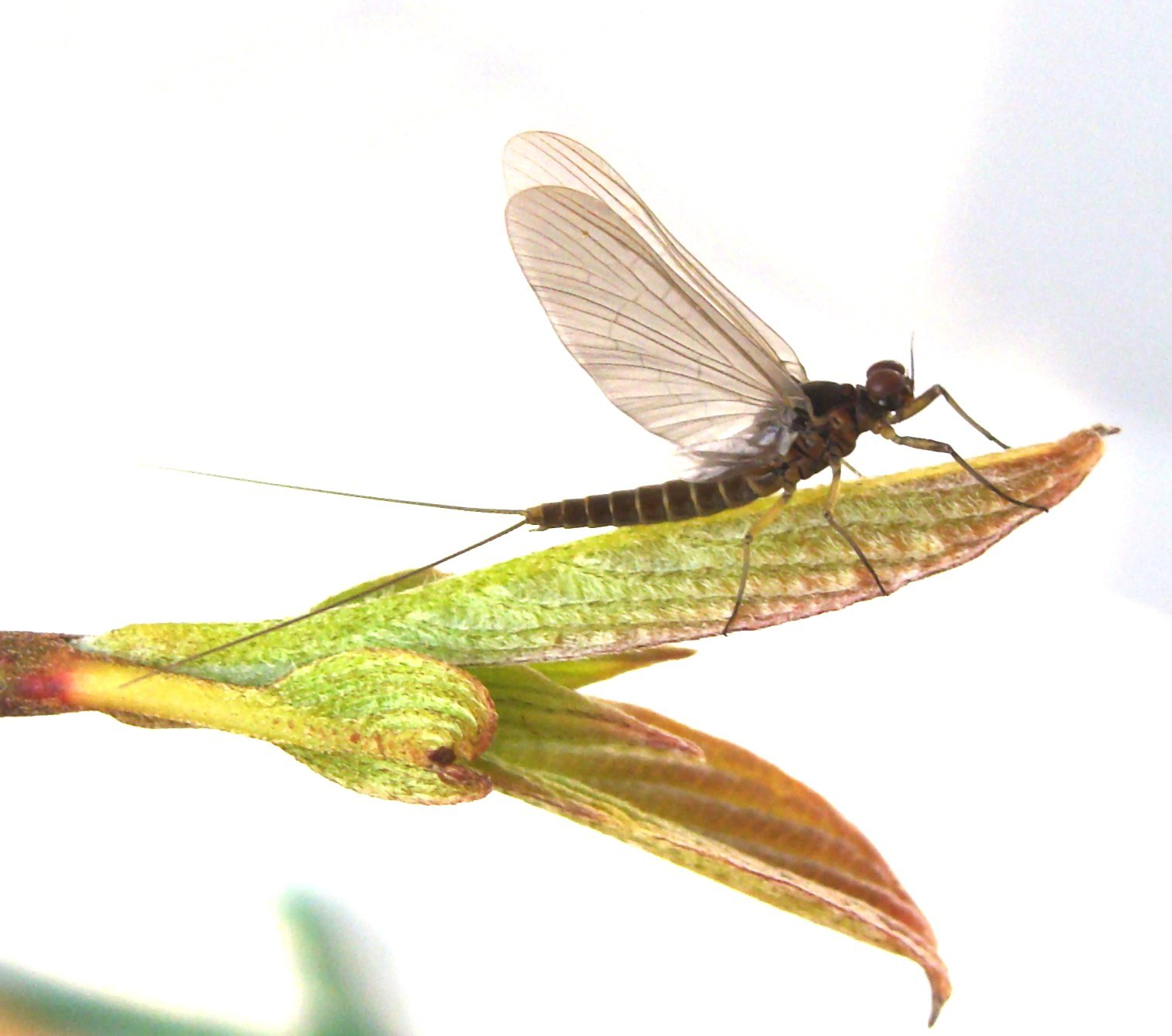 Ephemeridae